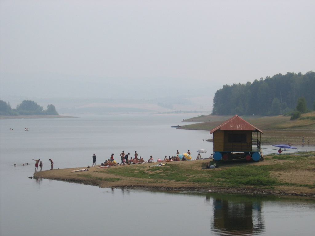 Vlasinsko jezero leti